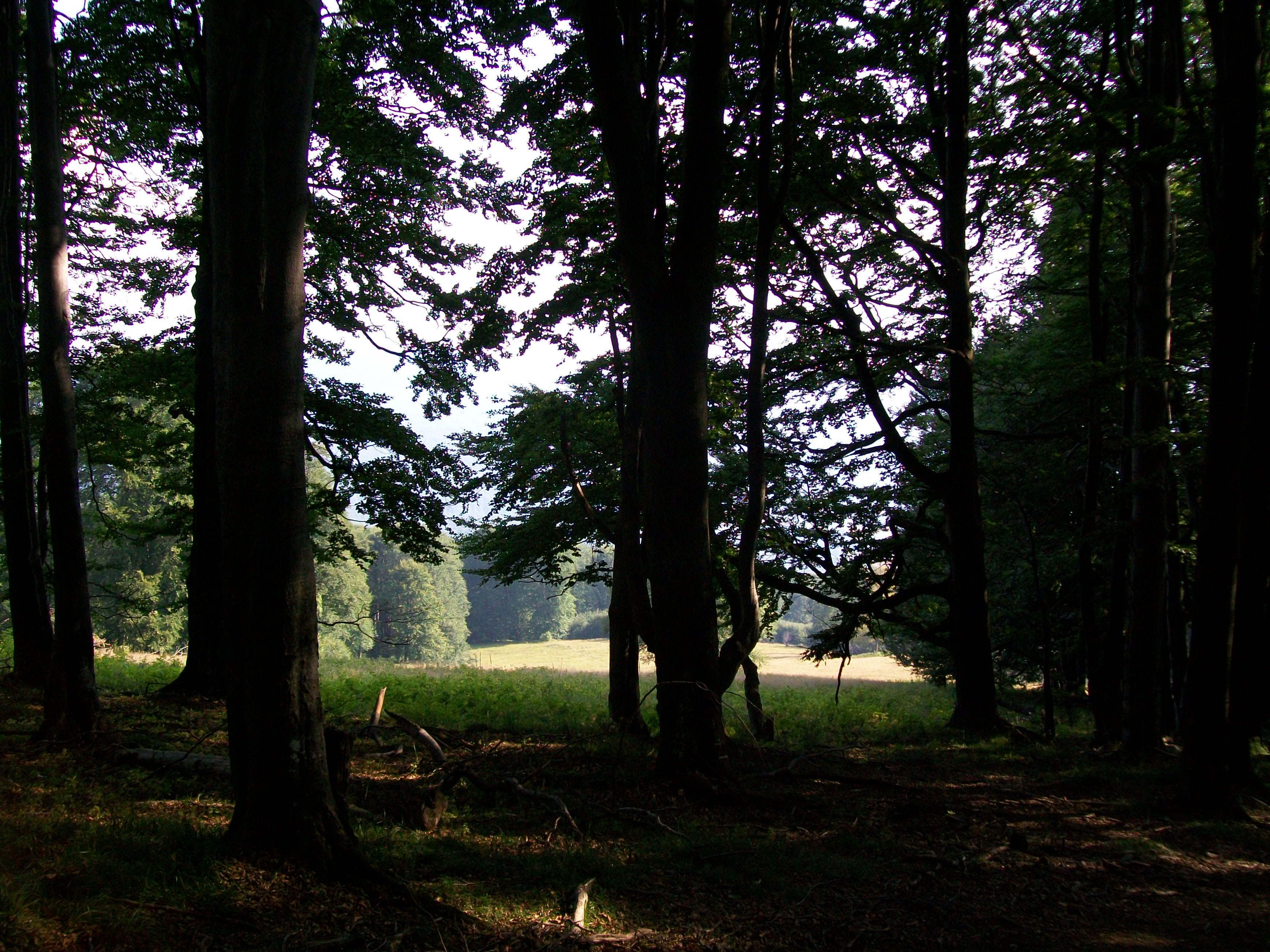 Хубава си, моя горо